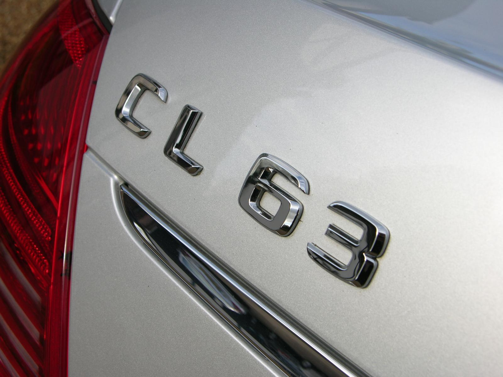 2007 Mercedes Benz CL63 AMG